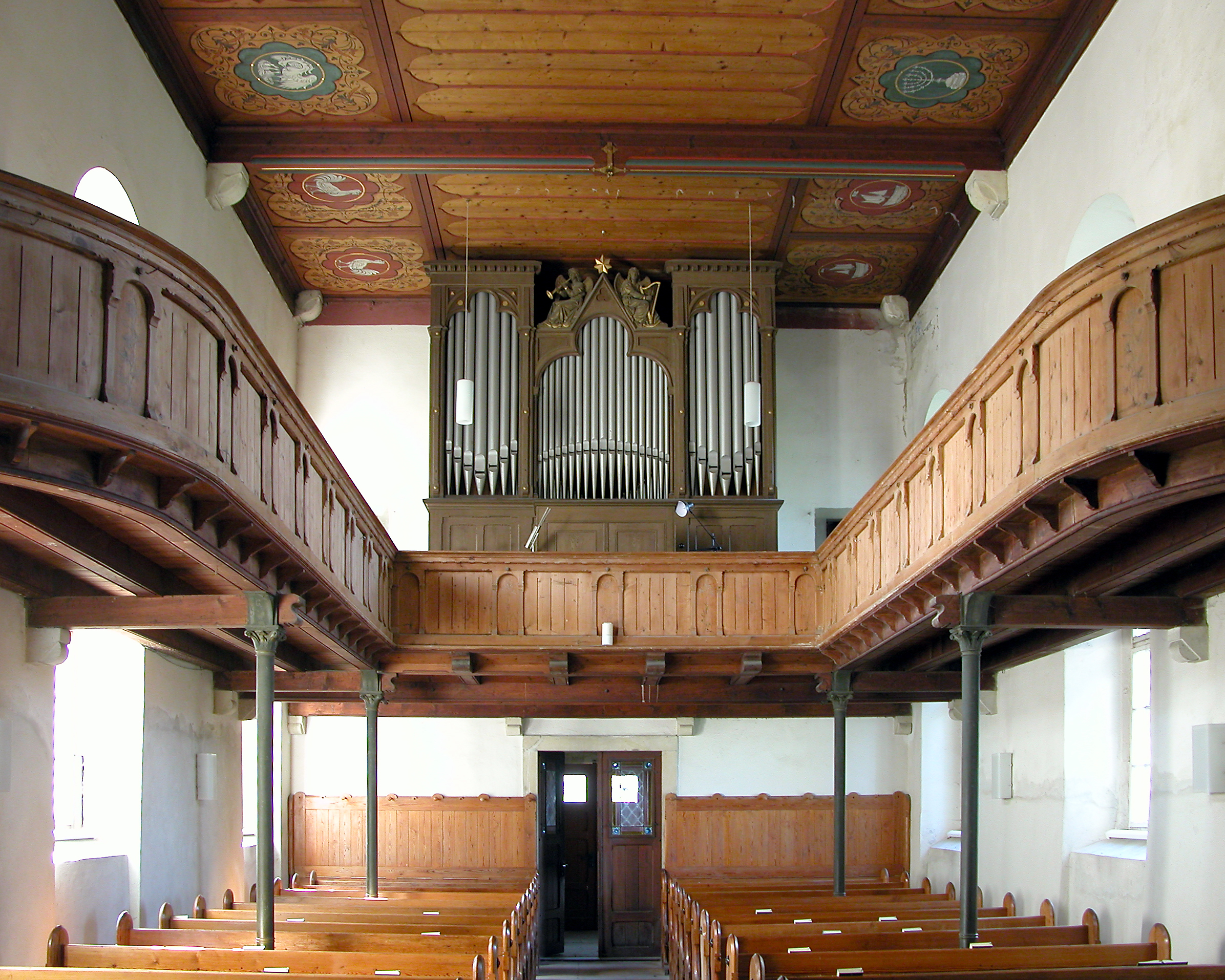 06.09.2007 01665 Constappel (Klipphausen): Ev.-Luth. Dorfkirche St. Nikolai (GMP: 51.104810,13.565966). Im Kern spätromanisch, später stark verändert. 1884 erweitert. Die Walker-Orgel ist vor einiger Zeit saniert worden. [DSCN29390.TIF]20070906405DR.JPG(c)Blobelt